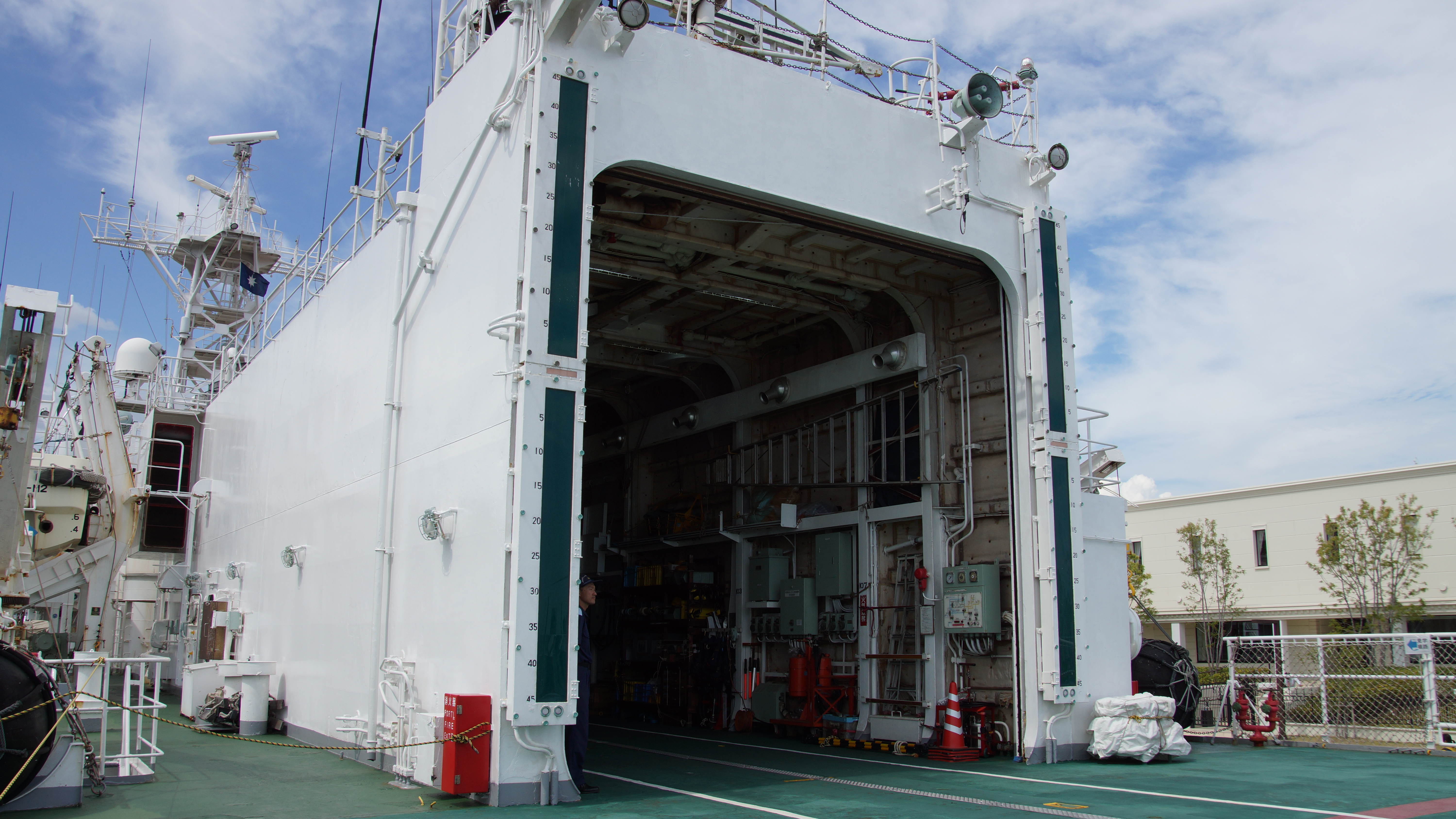 海上保安庁 ヘリコプター1機搭載型巡視船せっつ（PLH-07） ヘリ格納庫 左舷後部。2017年7月22日 神戸港にて。